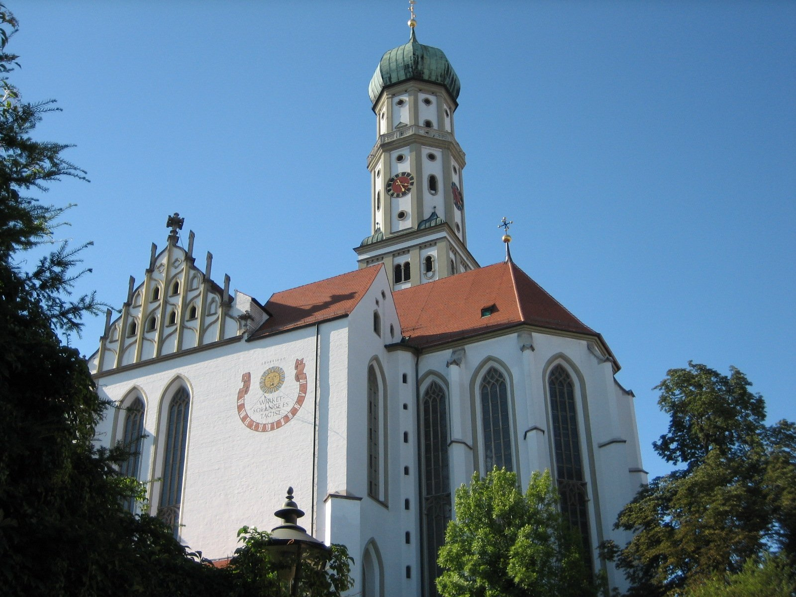 Augsburg: Basilika St. Ulrich und St. Afra im Nachmittagslicht